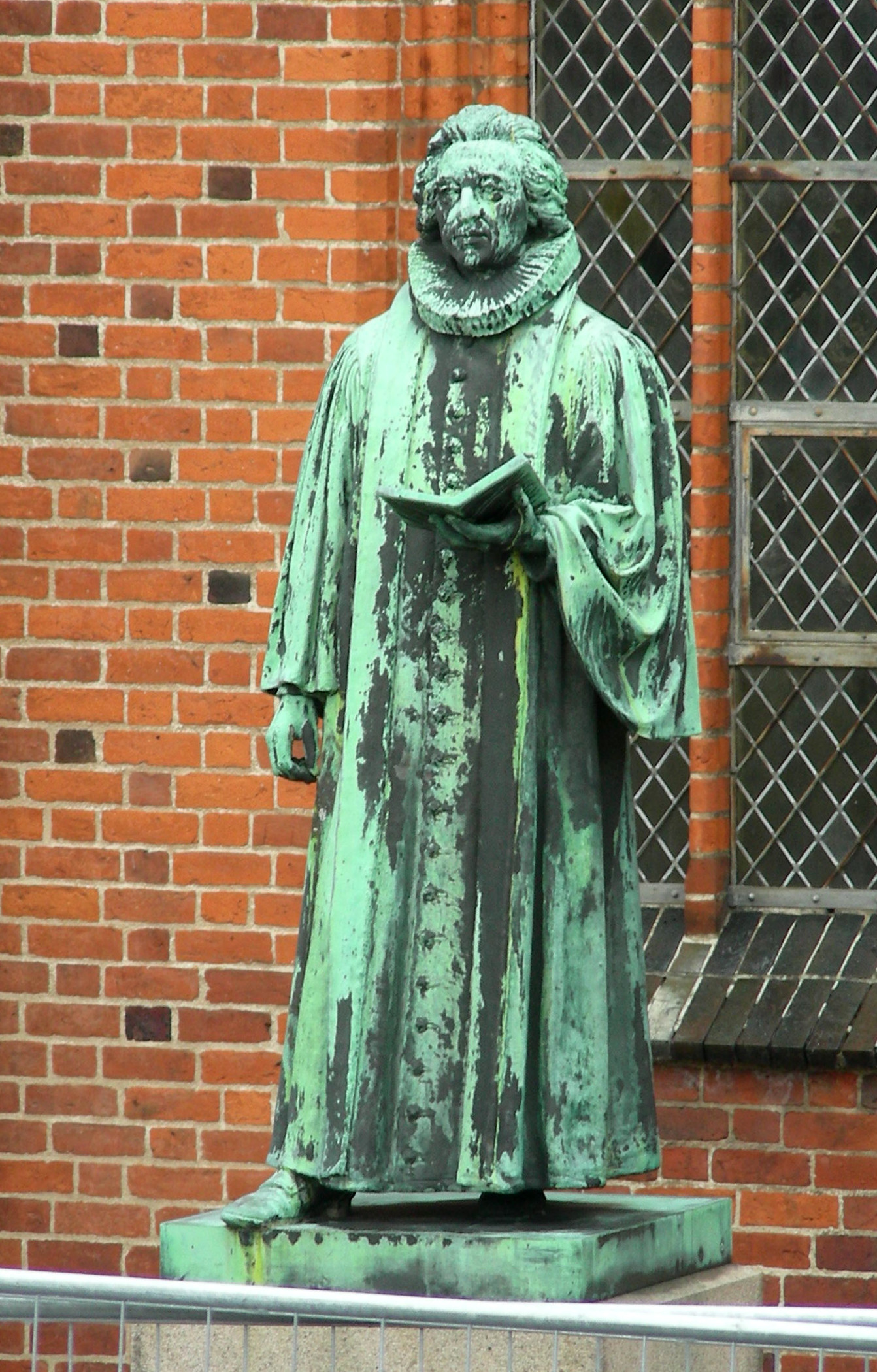 Ribe Domkirke i Ribe, Denmark. Statue of Hans Adolf Brorson. Copy of August Saabye's statue for Frederiks Kirke in Copenhagen.